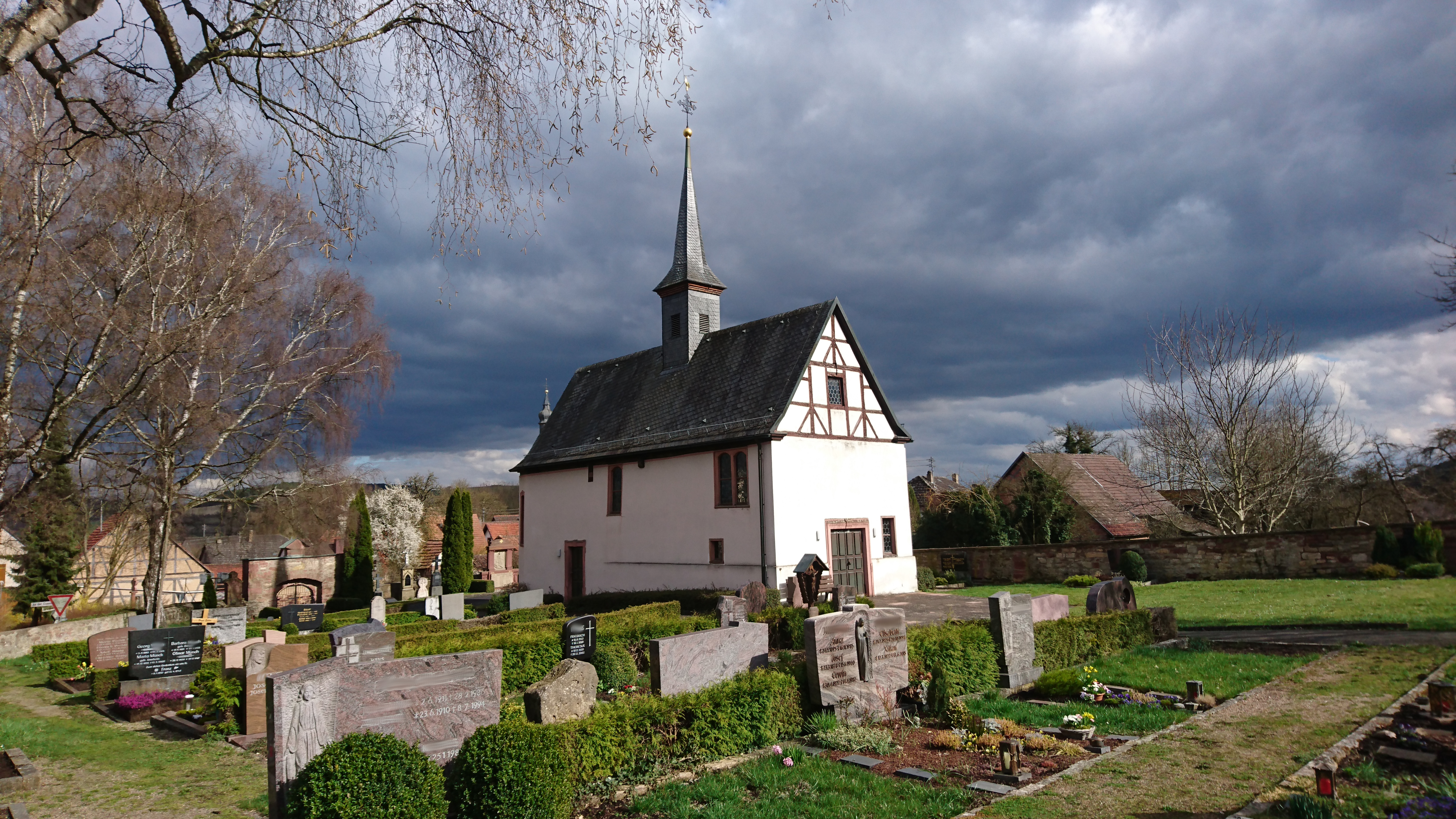 Friedhofkappelle Hochhausen (Tauberbischofsheim)